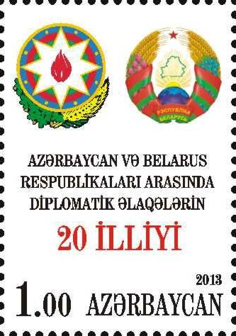 N 1107 - 1 manat. The 20th Ann. of the Azerbaijan - Belarus diplomatic relations. Joint issue.